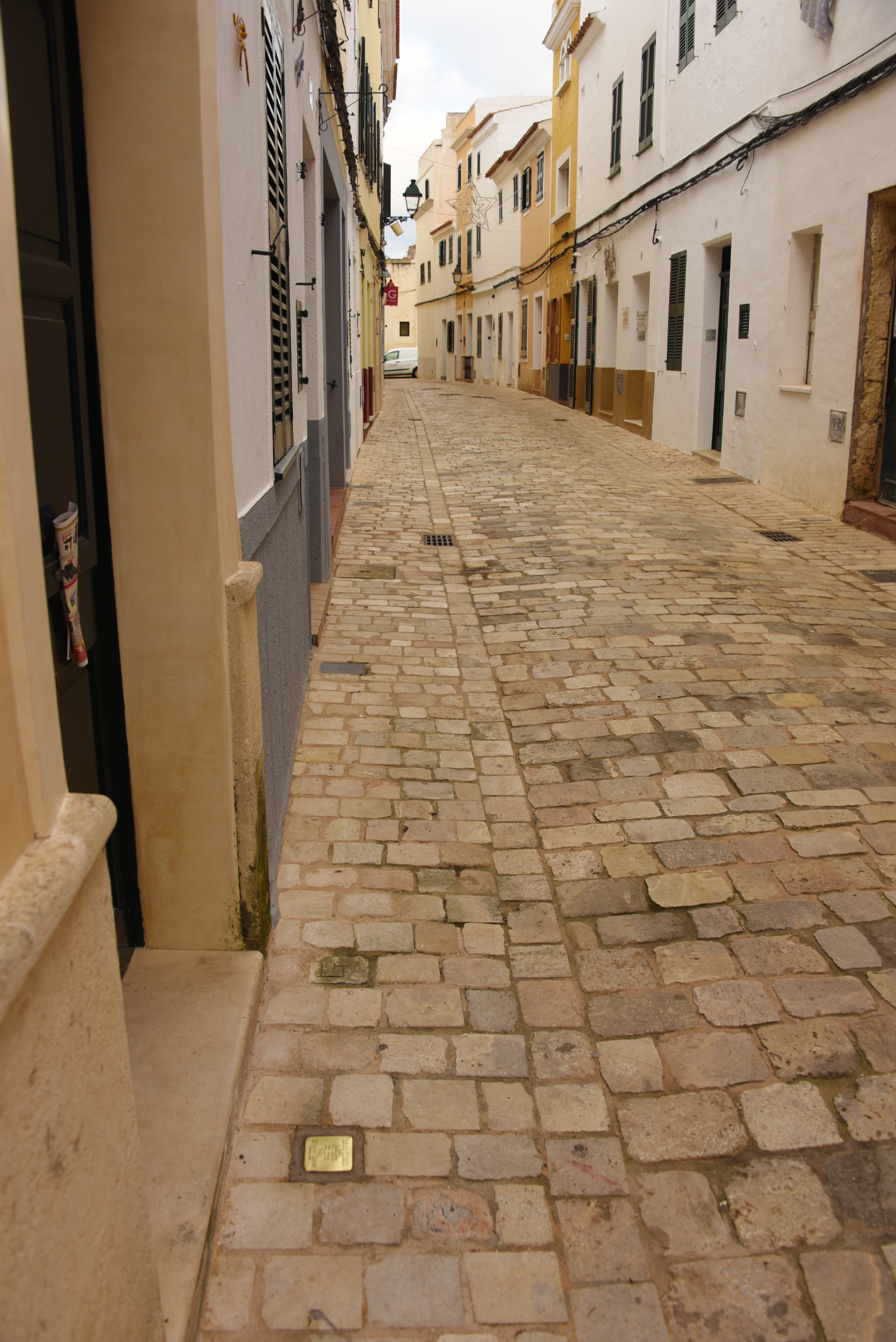 Stolpersteine in Ciutadella